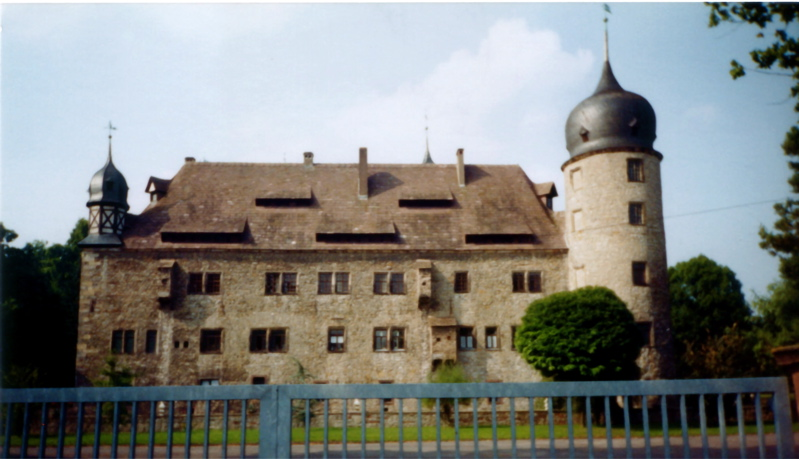 Schloss Hehlen